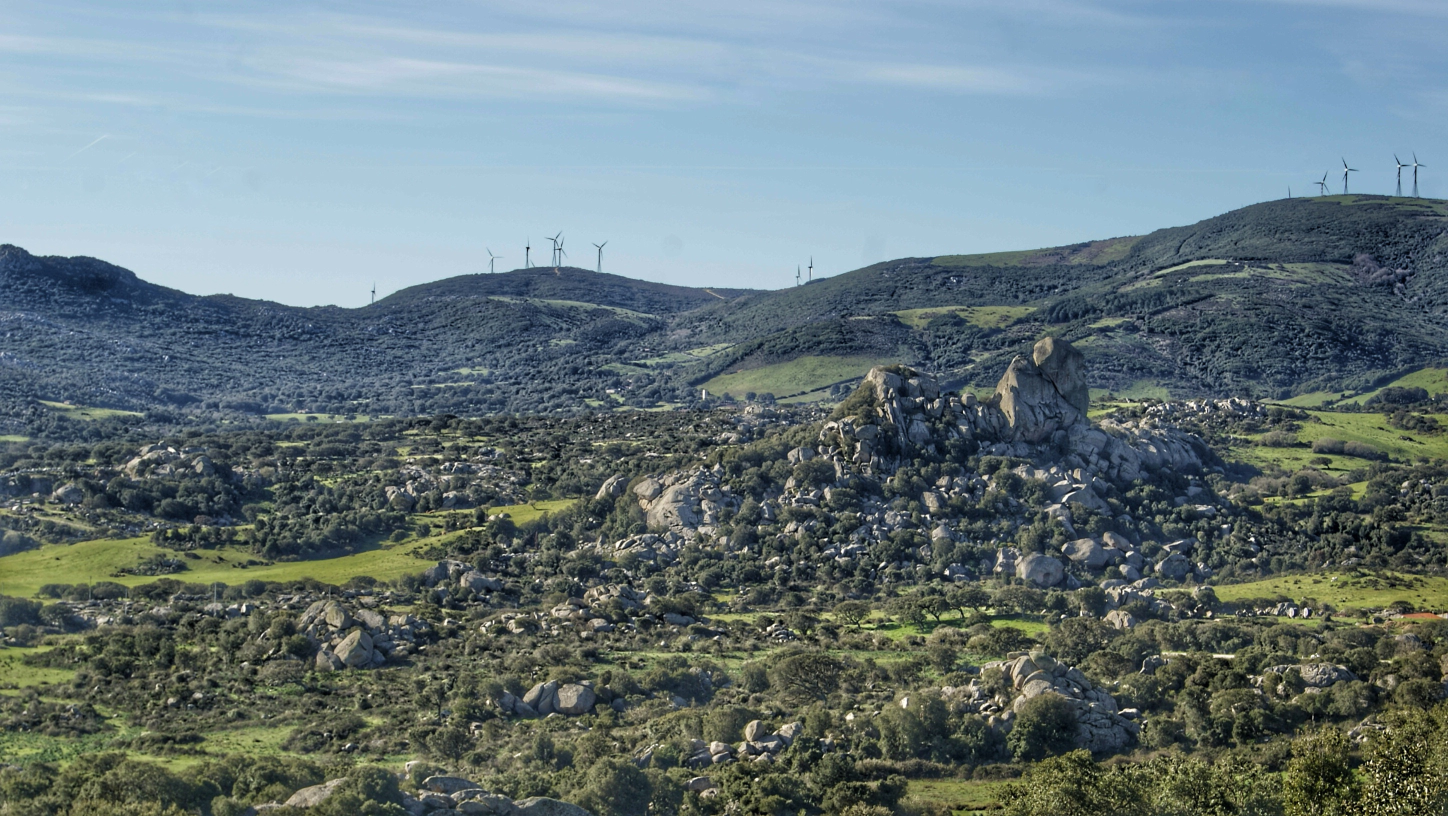 Valle della Luna di Aggius (Piana dei Gran Sassi)